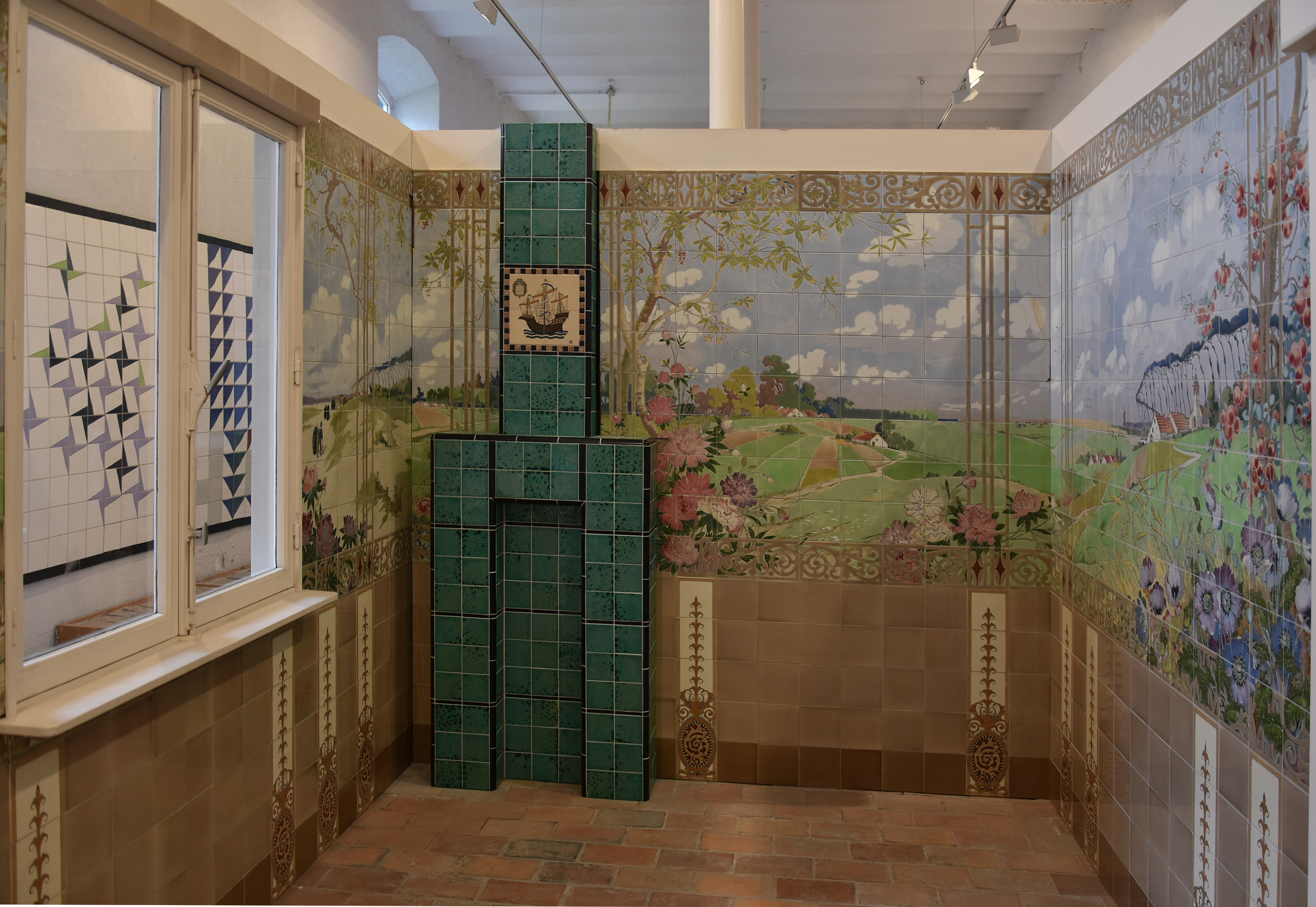 Gilliot & Roelants tegelmuseum Hemiksem 27-07-2019 14-36-36 This photo of immovable heritage has been taken in the Flemish Region